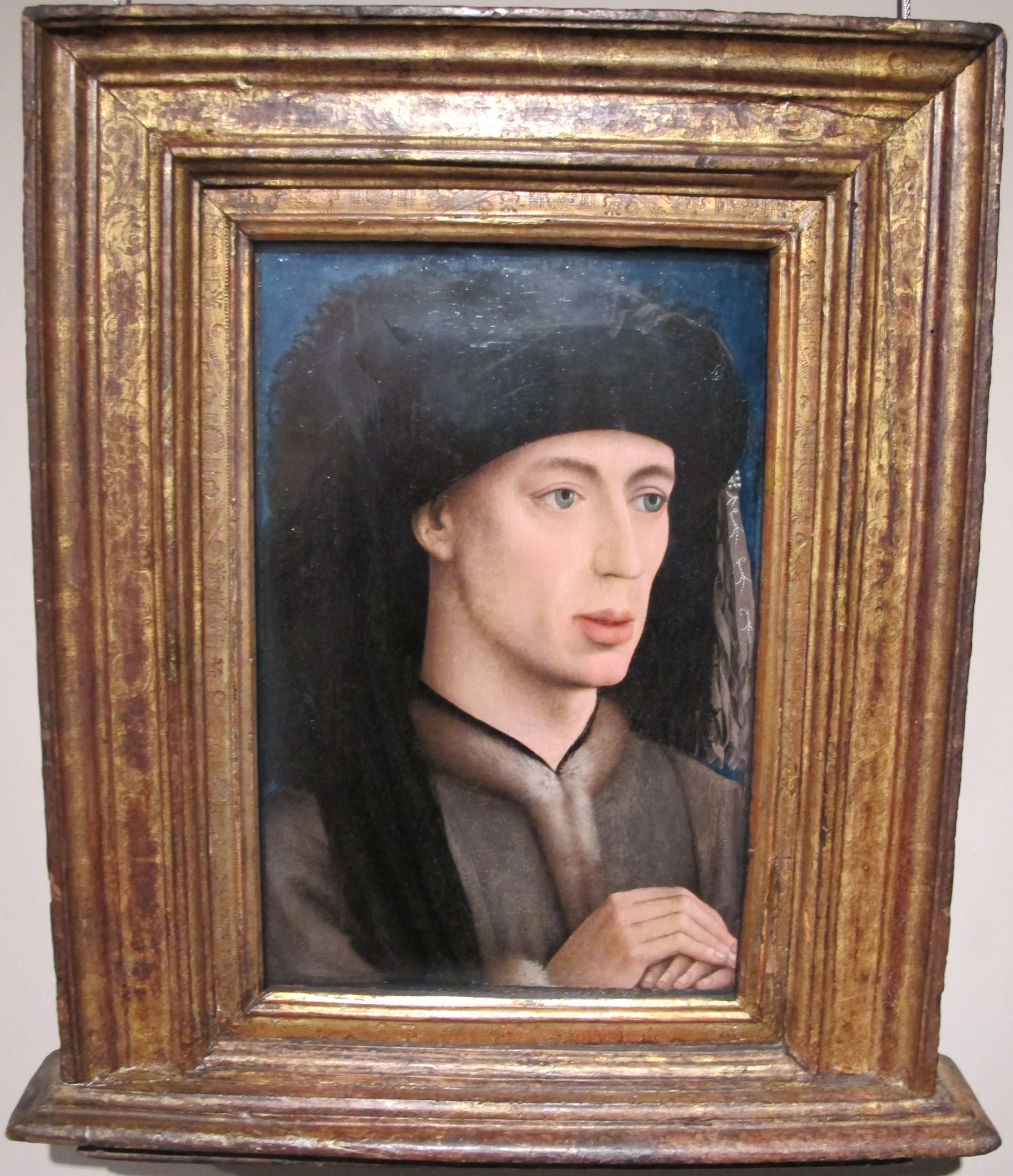 Seguace di rogier van der weyden, ritratto d'uomo, anni 1430